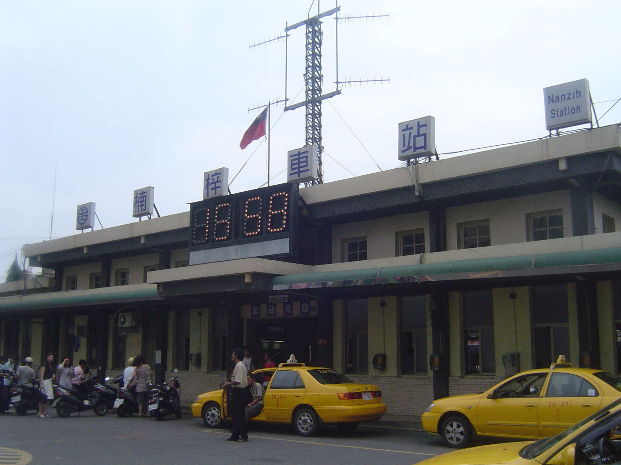 中文（台灣）: 臺灣鐵路管理局楠梓車站。